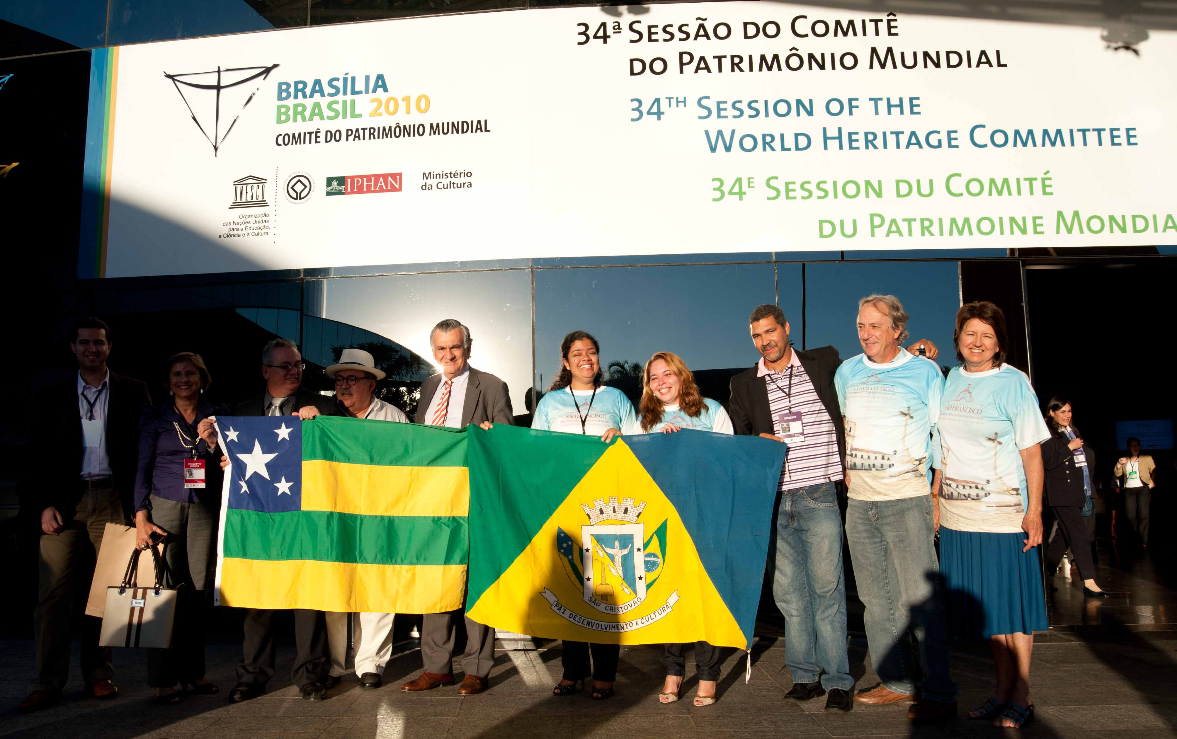 Ministro da Cultura, Juca Ferreira, comemora com os representantes do Estado de Sergipe a inscrição da Praça São Francisco, em São Cristóvão (SE), na Lista do Patrimônio Mundial da Unesco. Votação aconteceu durante a 34ª Sessão do Comitê do Patrimônio Mundial da Unesco, sediada em Brasília de 25 de julho a 3 de agosto. Foto: Pedro França